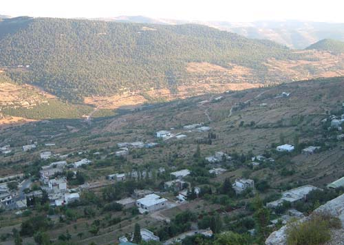 قرية كاف الجاع شرقي ناحية القدموس على طريق عام القدموس - مصياف